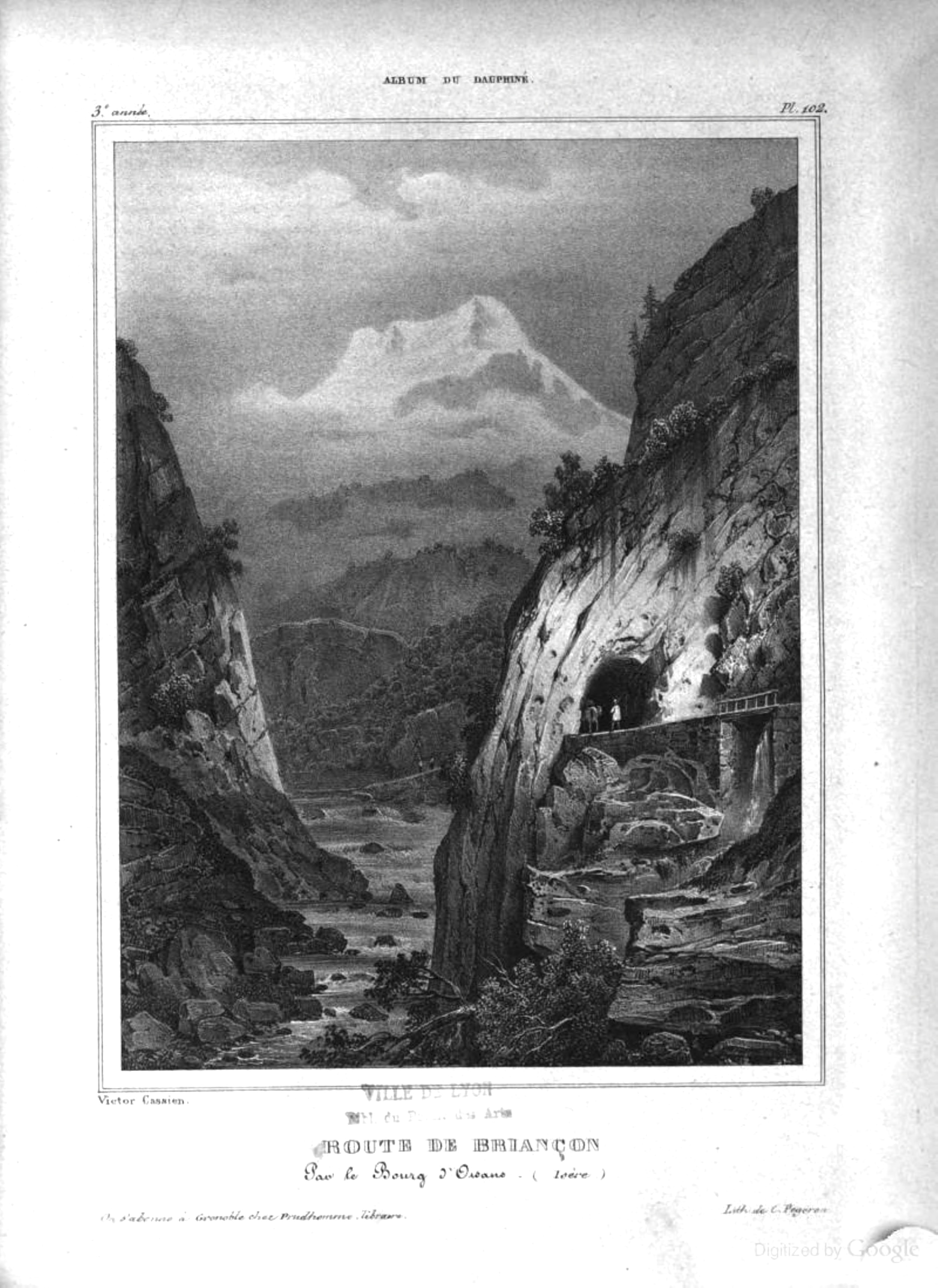 Album du Dauphiné - tome III, litographie, Le Bourg-d'Oisans